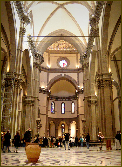 Interior da Catedral de Florença, Itália.